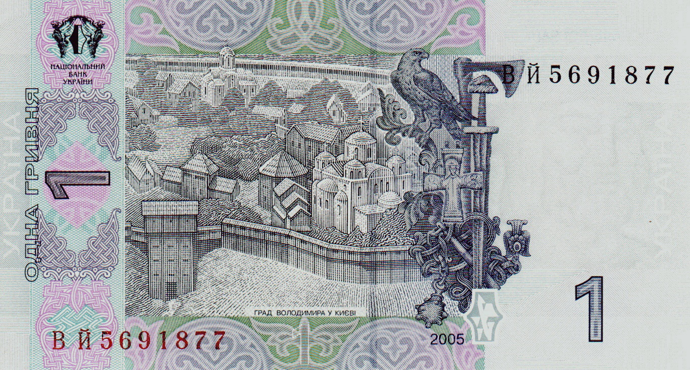 1 Hryvnia 2005 back